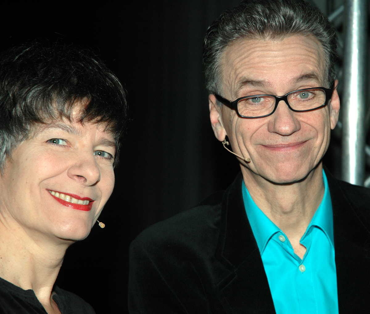 Silvana Prosperi und Thomas Prosperi sind FALTSCH WAGONI